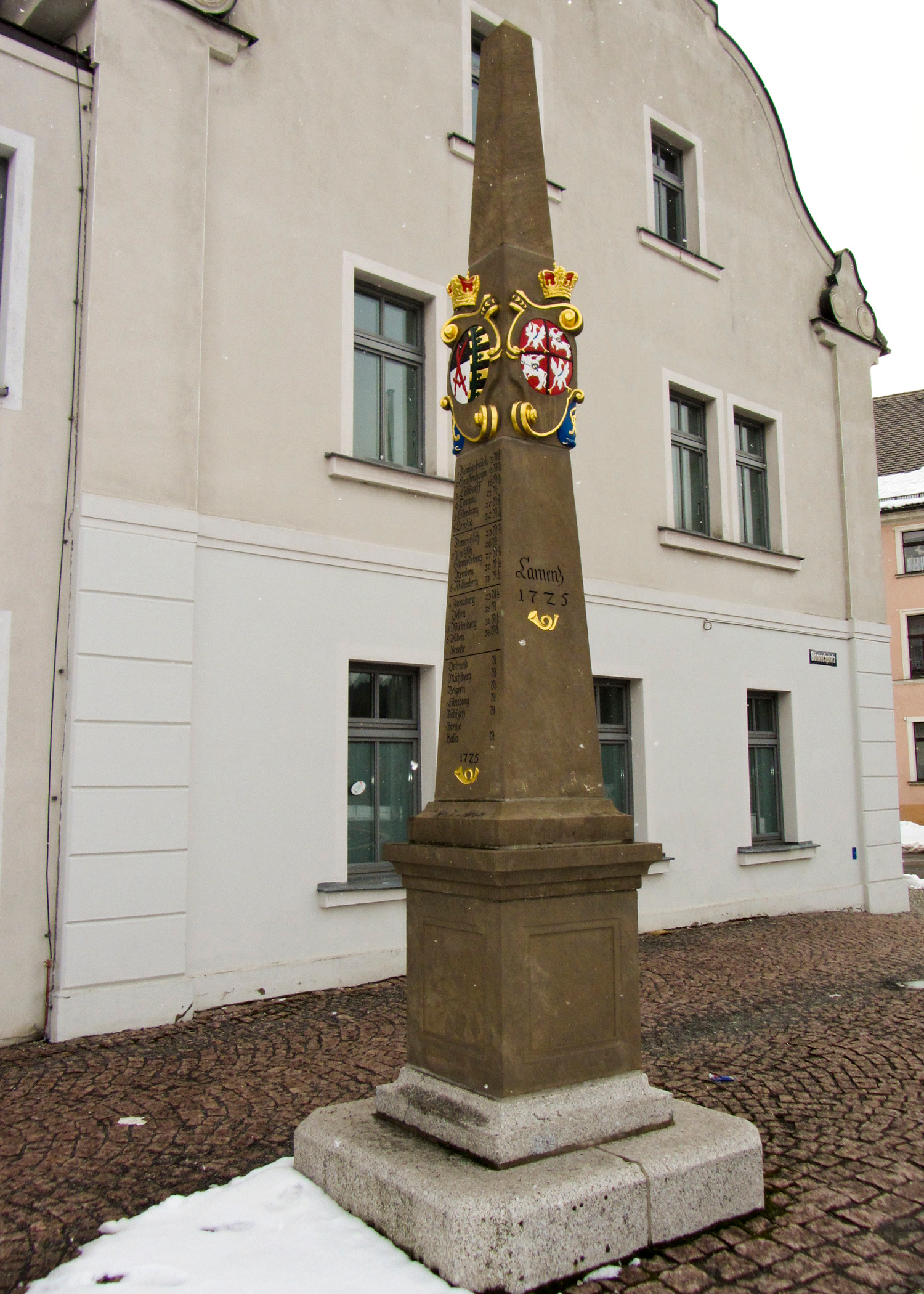 Kursächsische Postmeilensäule-Distanzsäule in Kamenz